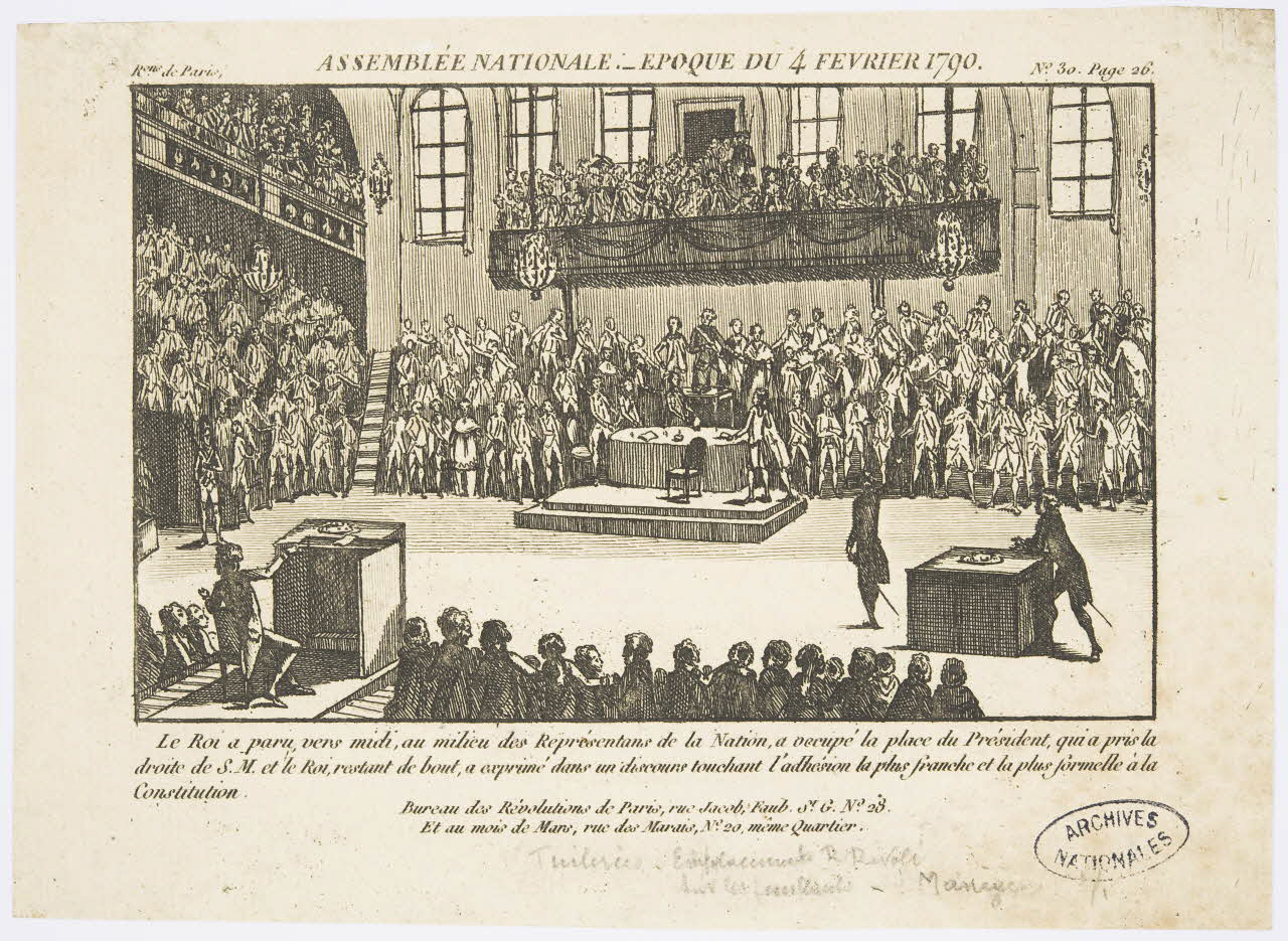 Gravure : Assemblée nationale, époque du 4 février 1790